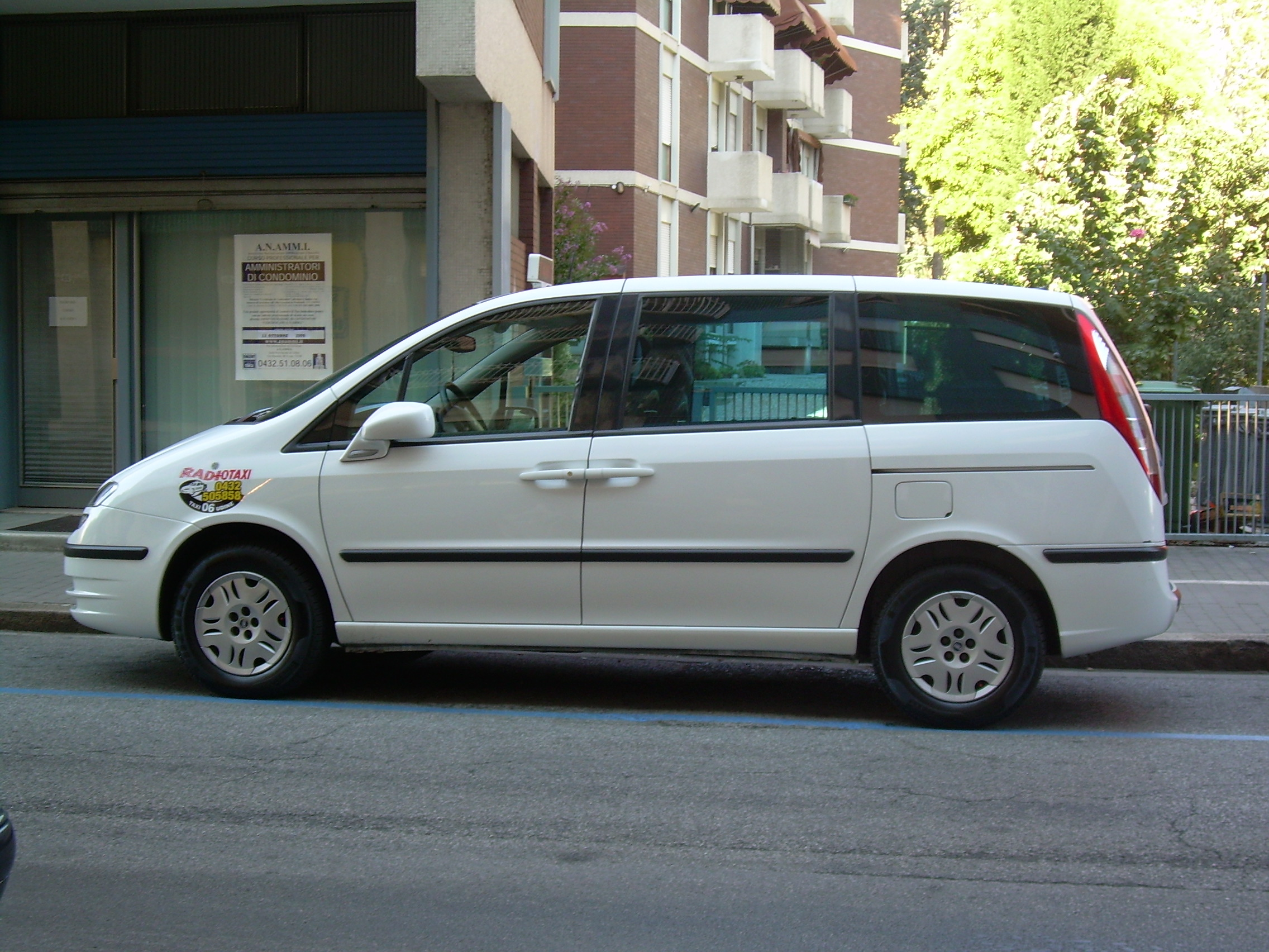 Fiat Ulysse seconda serie fiancata